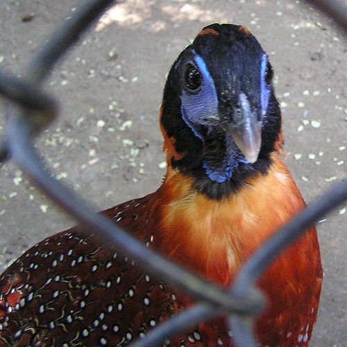 Tragopan di Temminck